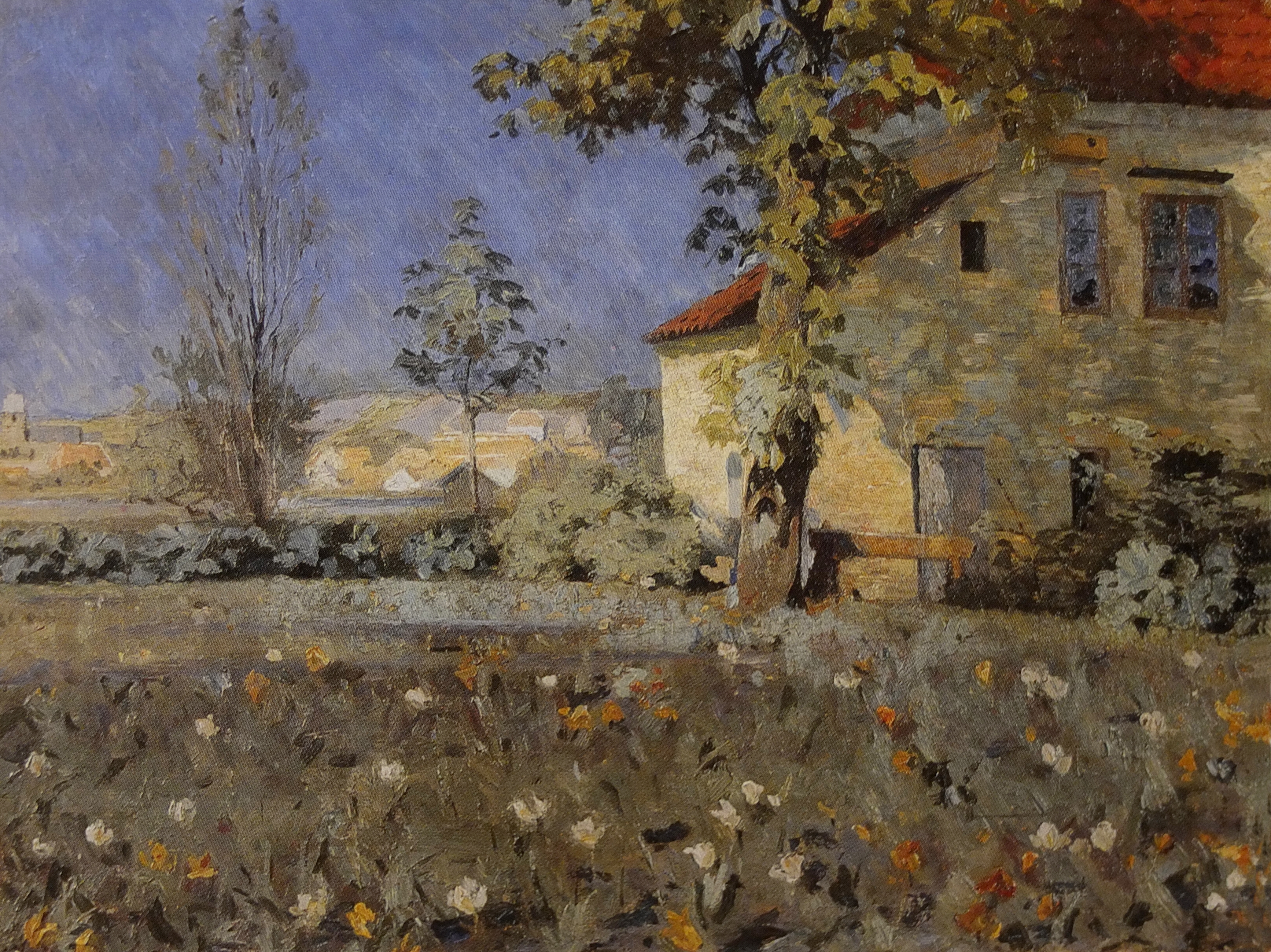 Maison dans un jardin, Christian Mourier Petersen, vers 1890. Van Gogh Museum, Amsterdam.